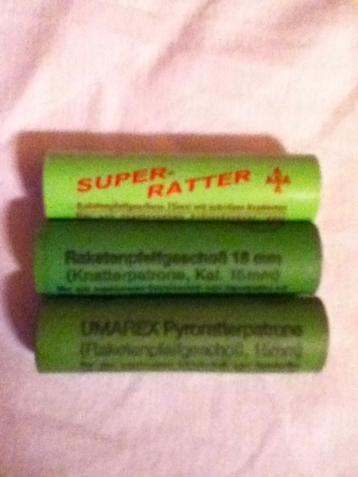 3 verschiedene Ratterpatronen